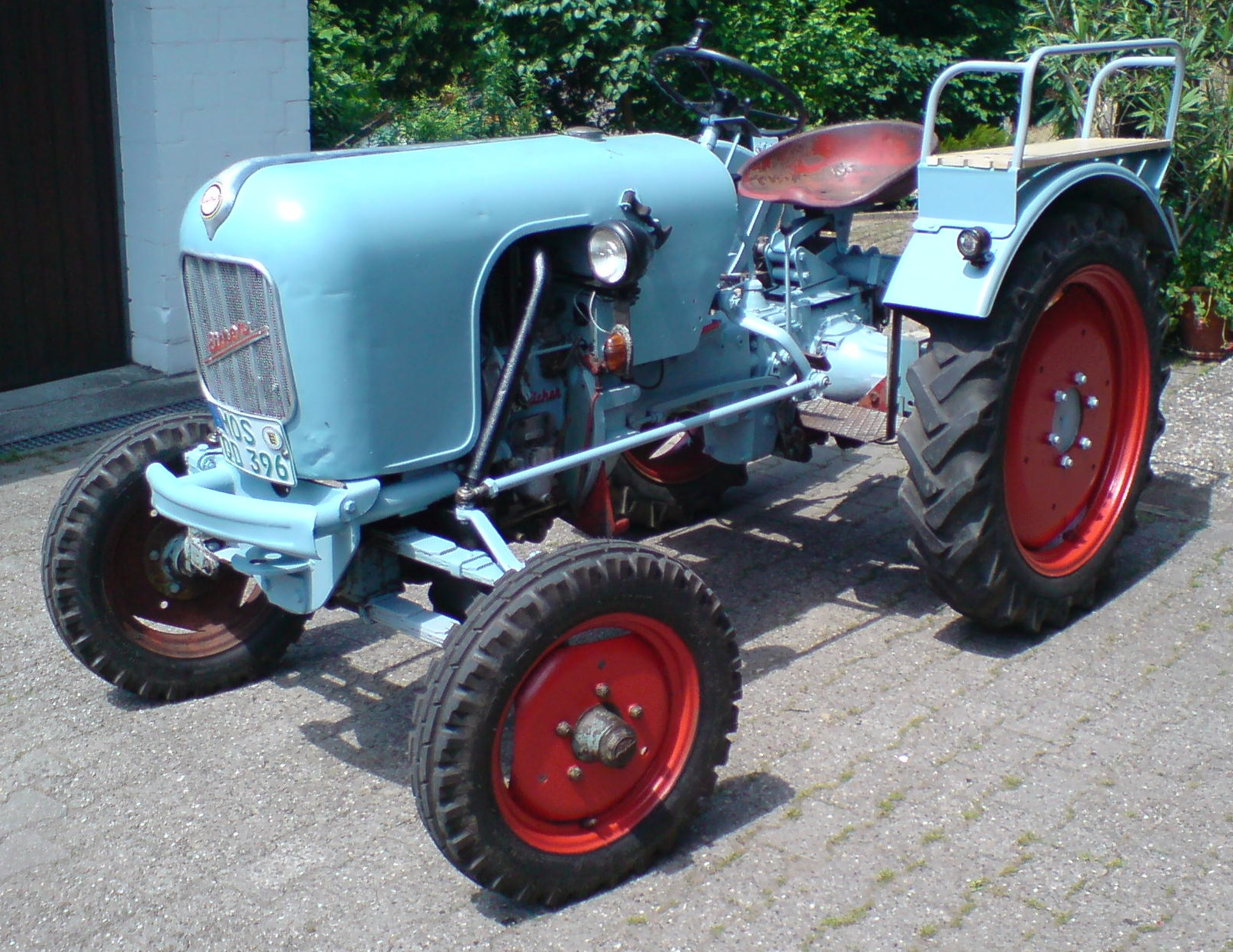 Eicher EM 100 B Leopard